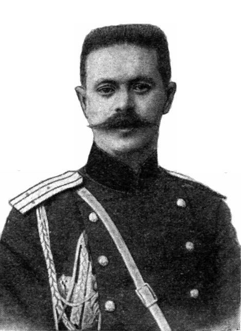 Подполковник Николай Александрович Данилов